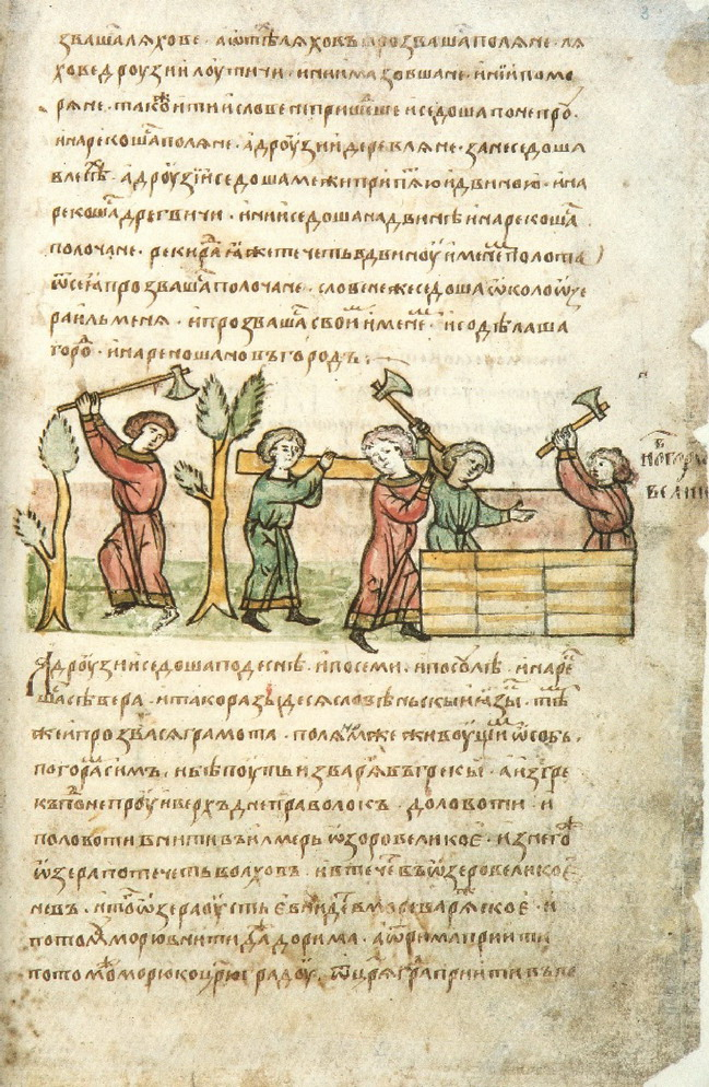 Радзивилловская (Кёнигсбергская) летопись.